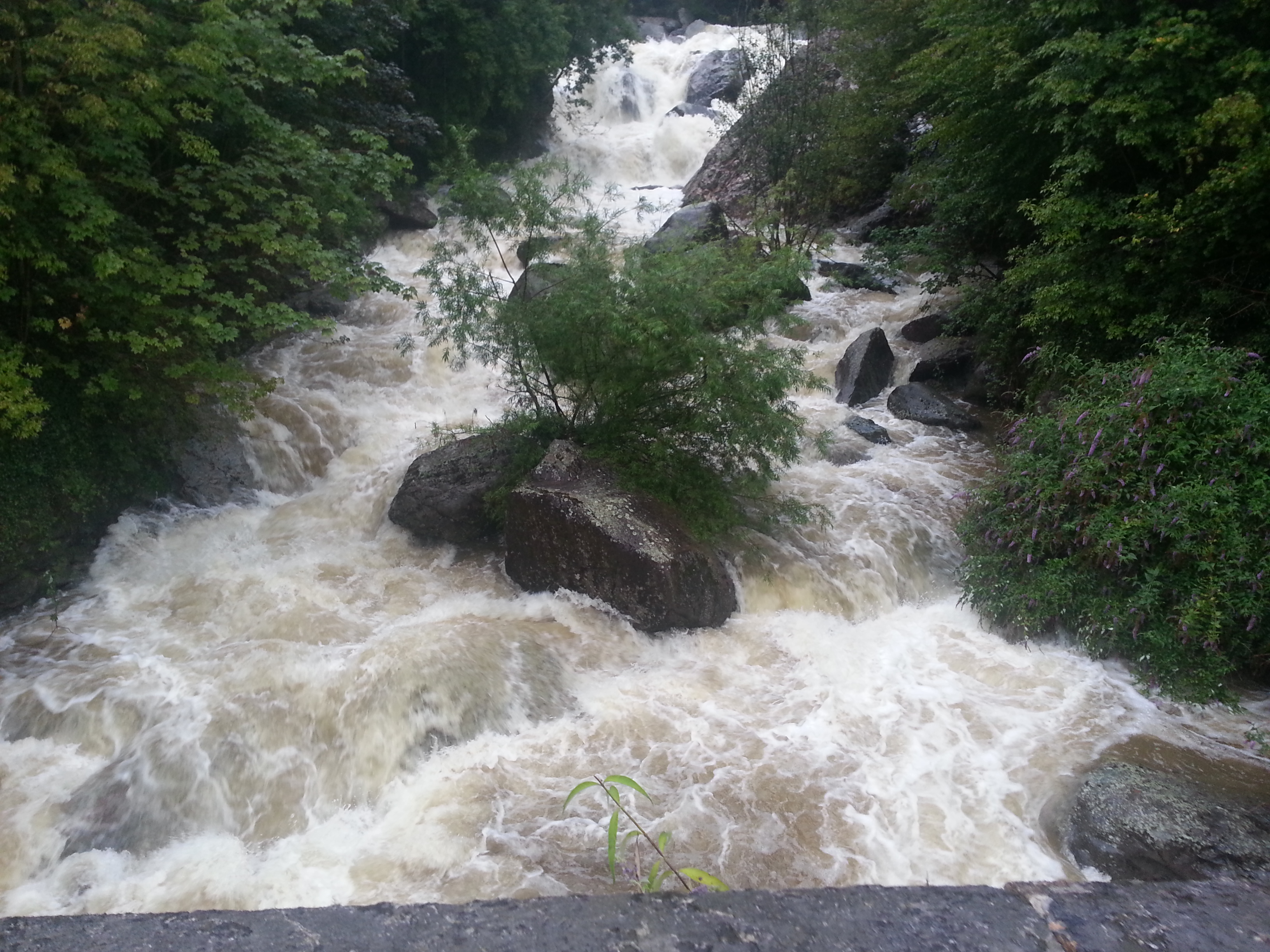 Torrente Goglio in località Pranzera di Gromo